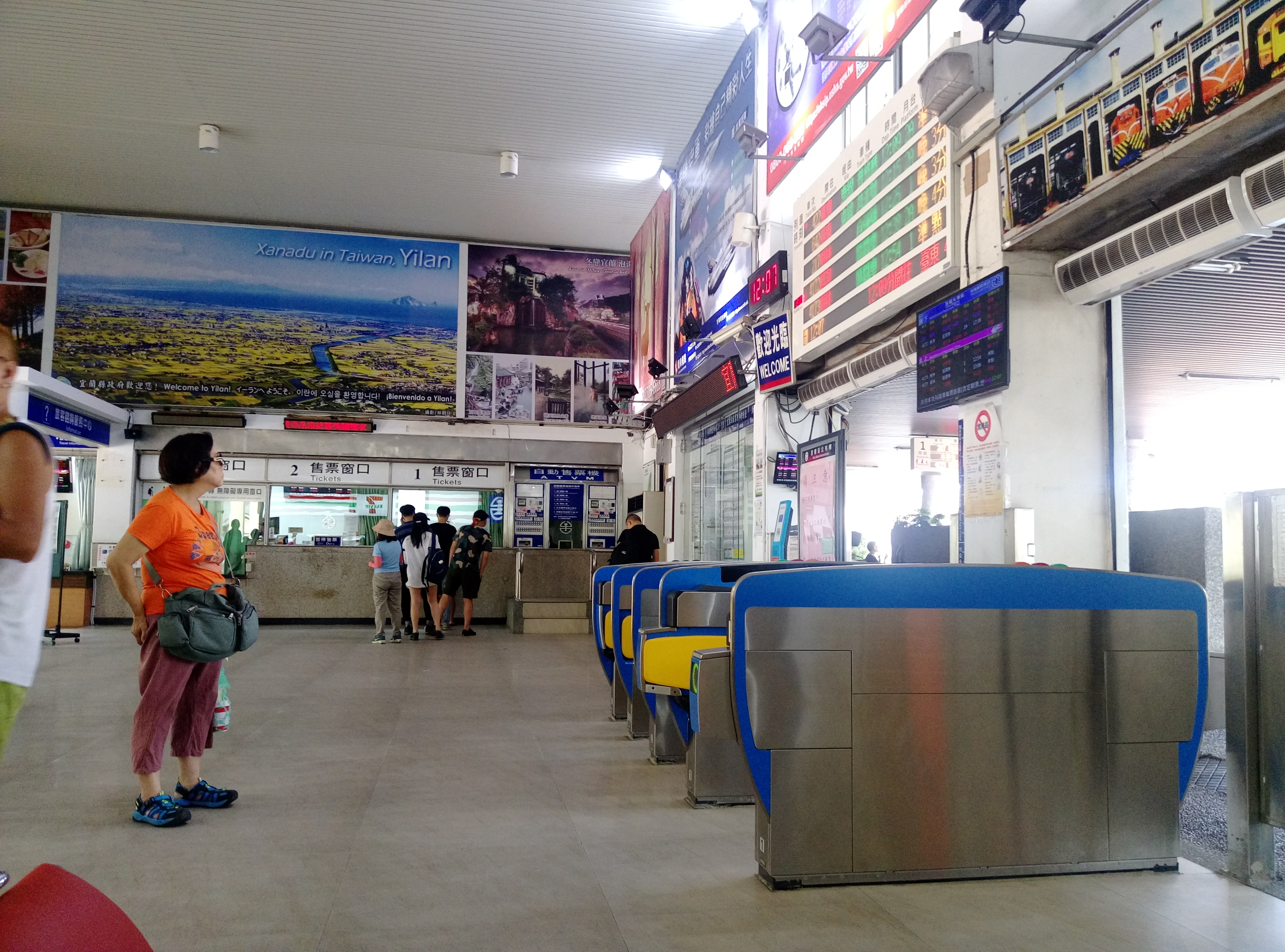 宜蘭車站內。